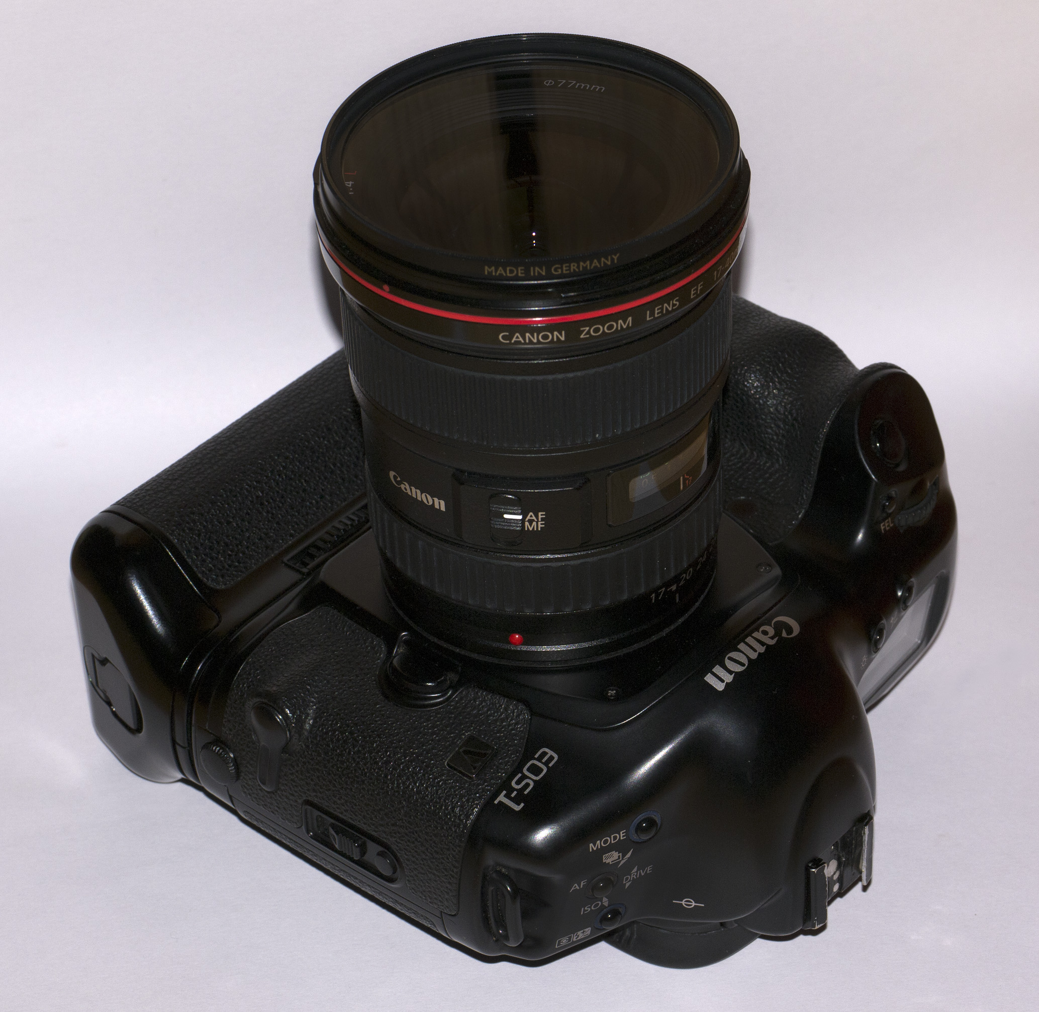 Canon EOS 1V HS mit EF 4/17-40mm Objektiv